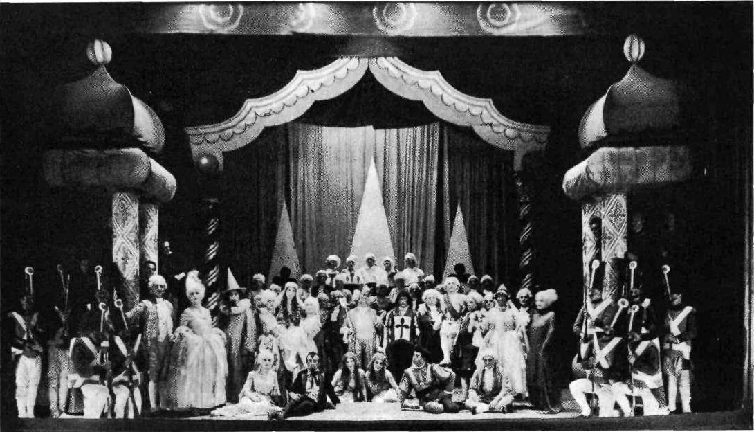 Predstava v Ljubljanski operi.